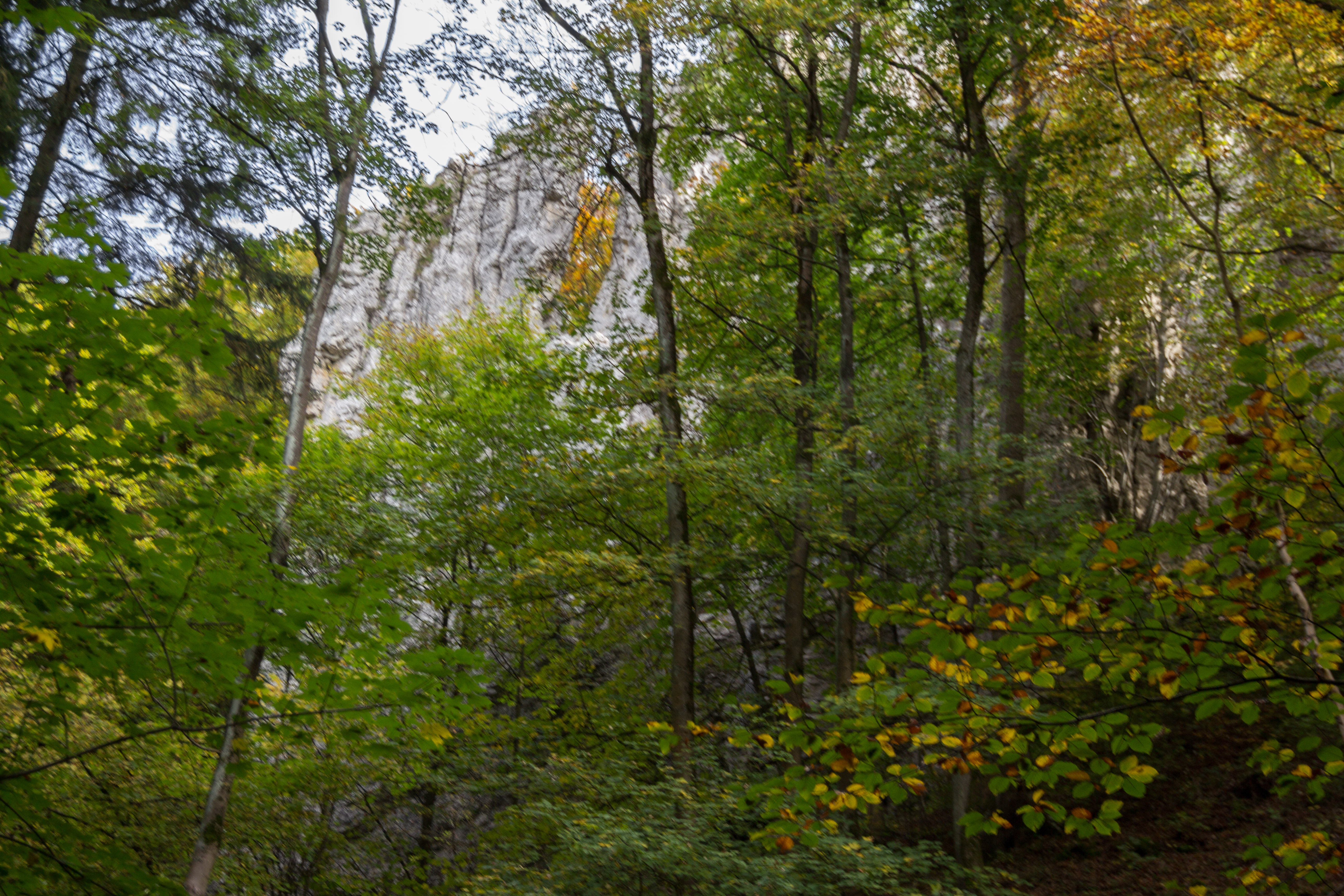 Düsselbacher Wand, Felswand, Vorra, Geotop